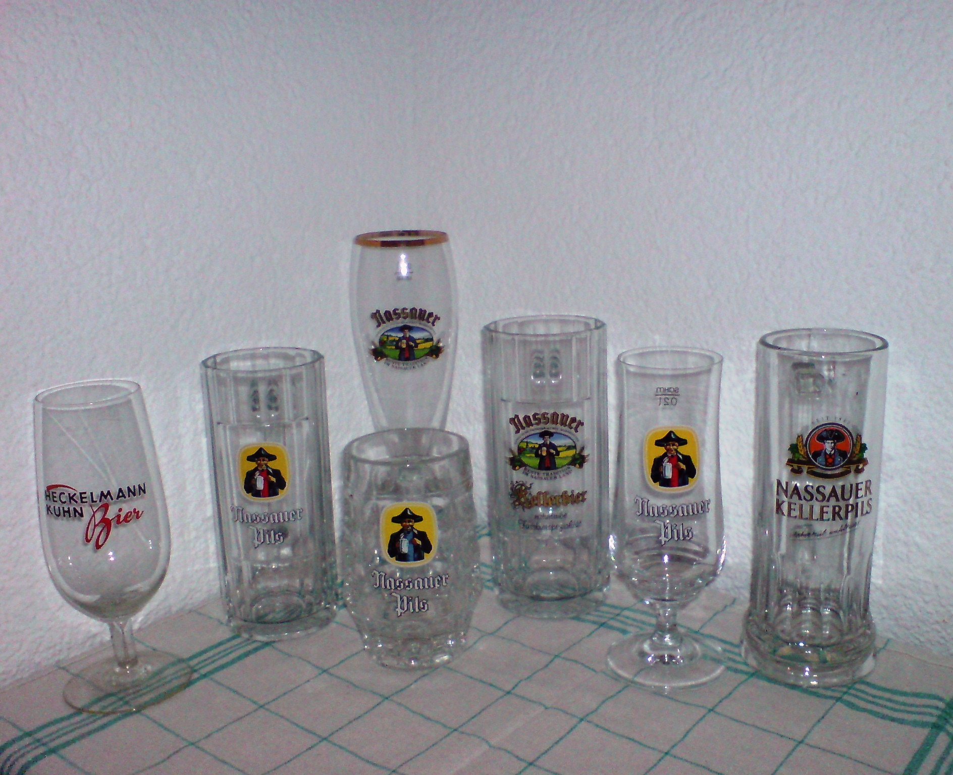 Nassauer Biergläser